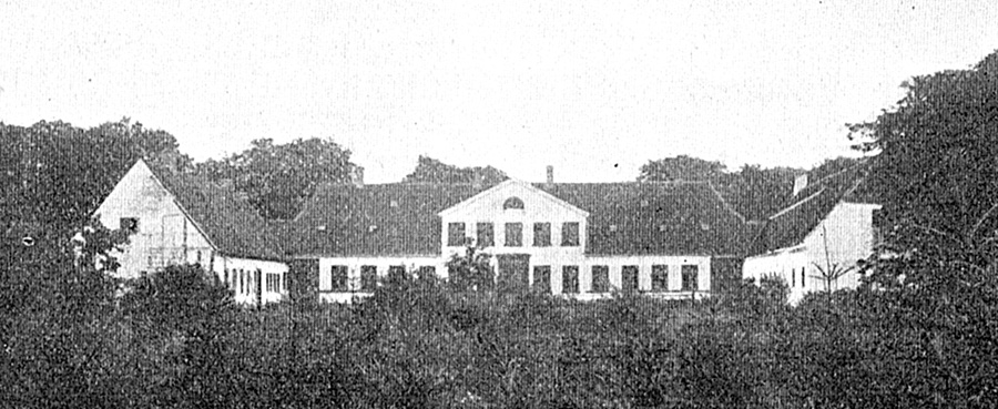 Broløkke nævnes første gang i 1325 og er nu en avlsgård under Hverringe Gods. Gården ligger i Viby Sogn, Bjerge Herred, Kerteminde Kommune. Hovedbygningen er opført i 1898 efter en brand i avlsbygningerne. Billedet viser den gamle hovedbygning fra før branden.